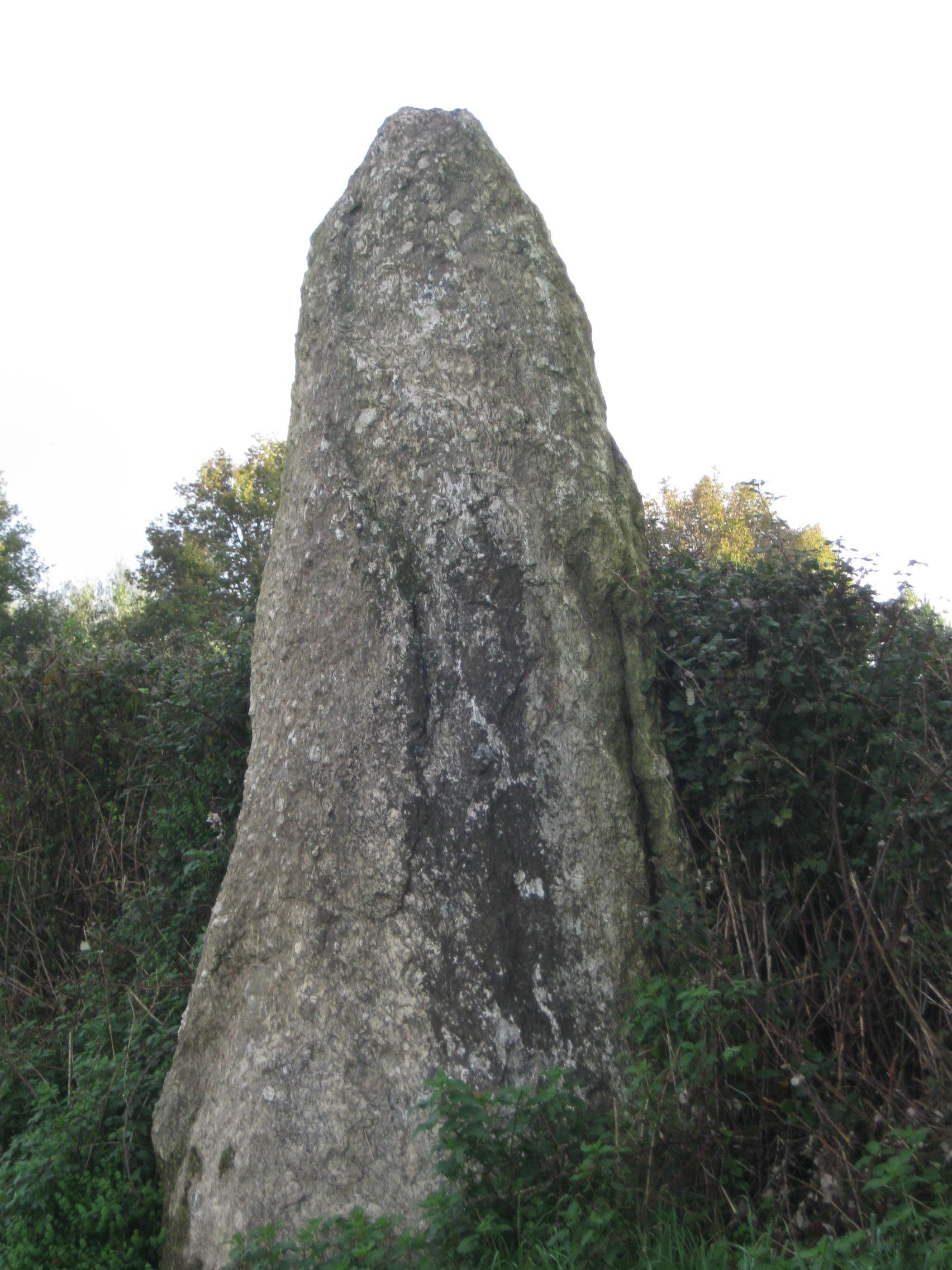 Pedrafita na aldea do Casal, Campos, no Concello de Melide (Galicia)